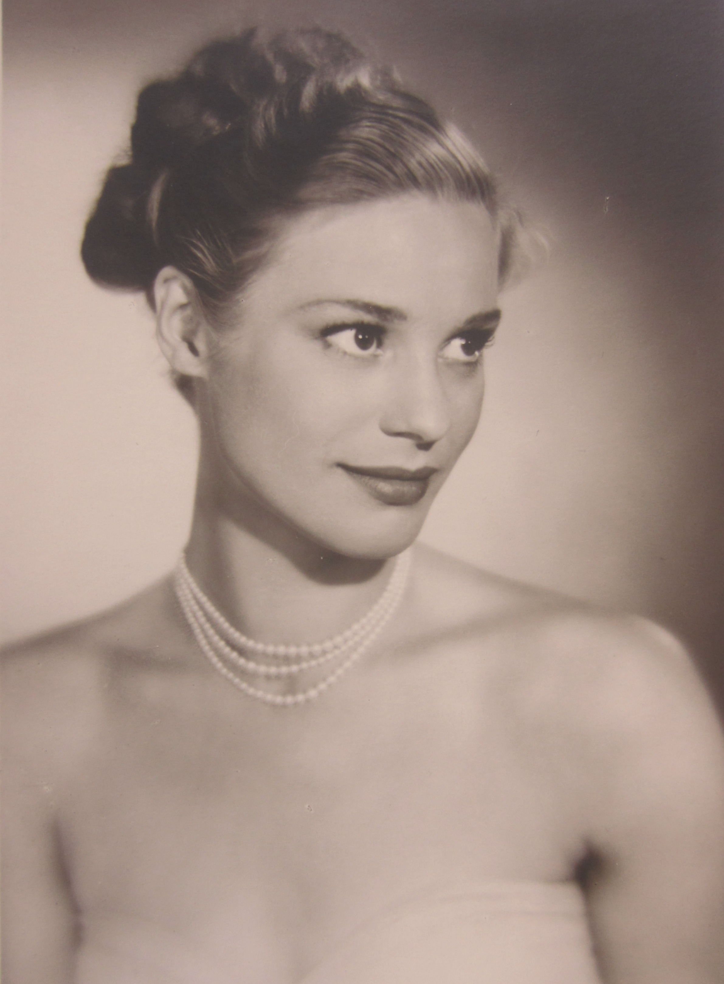 Ingrid Thulin, 1926–2004, svensk skådespelare. Foto från filmen Kärleken segrar.